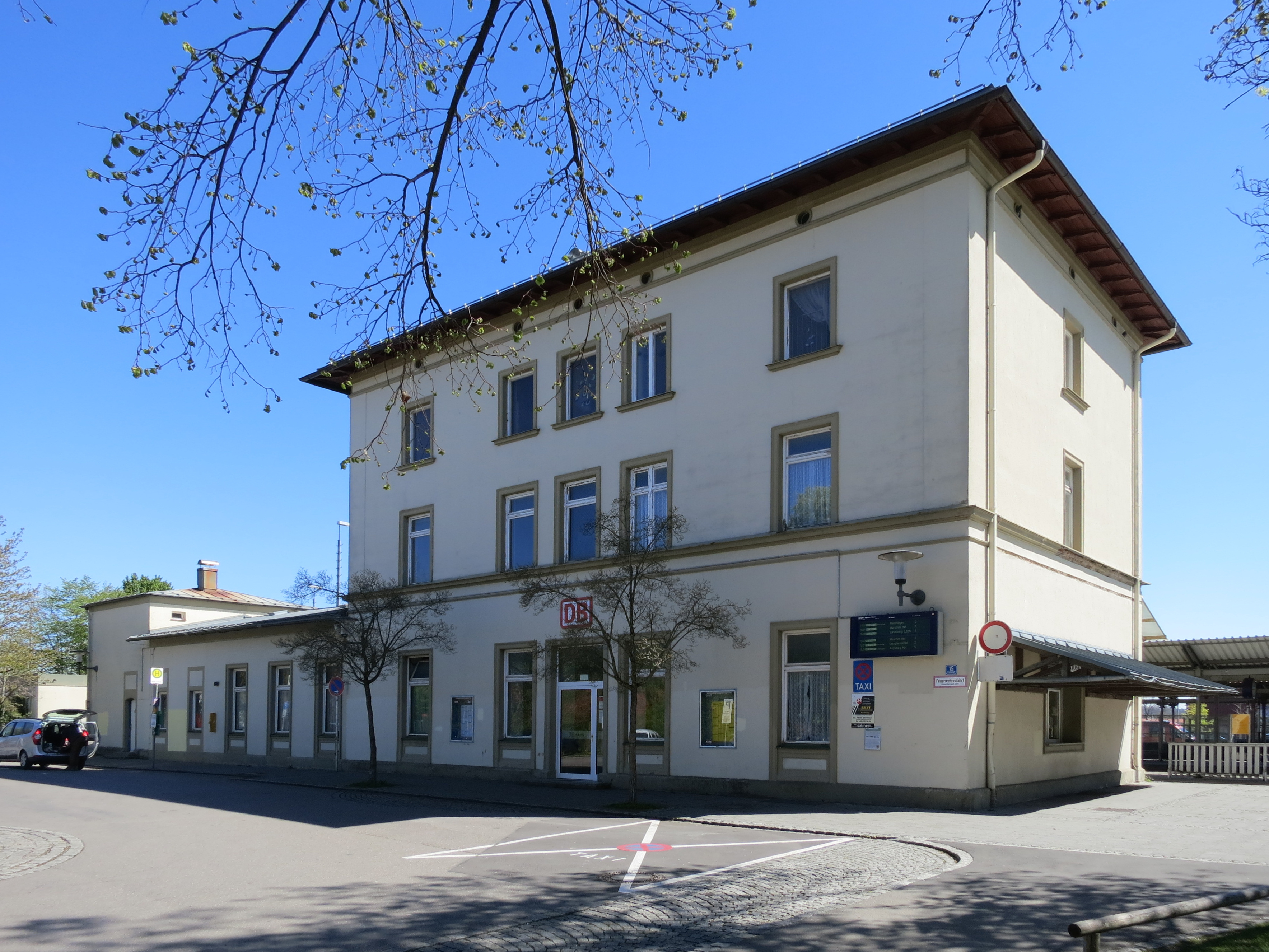 Empfangsgebäude des Bahnhofs Kaufering von der Straßenseite